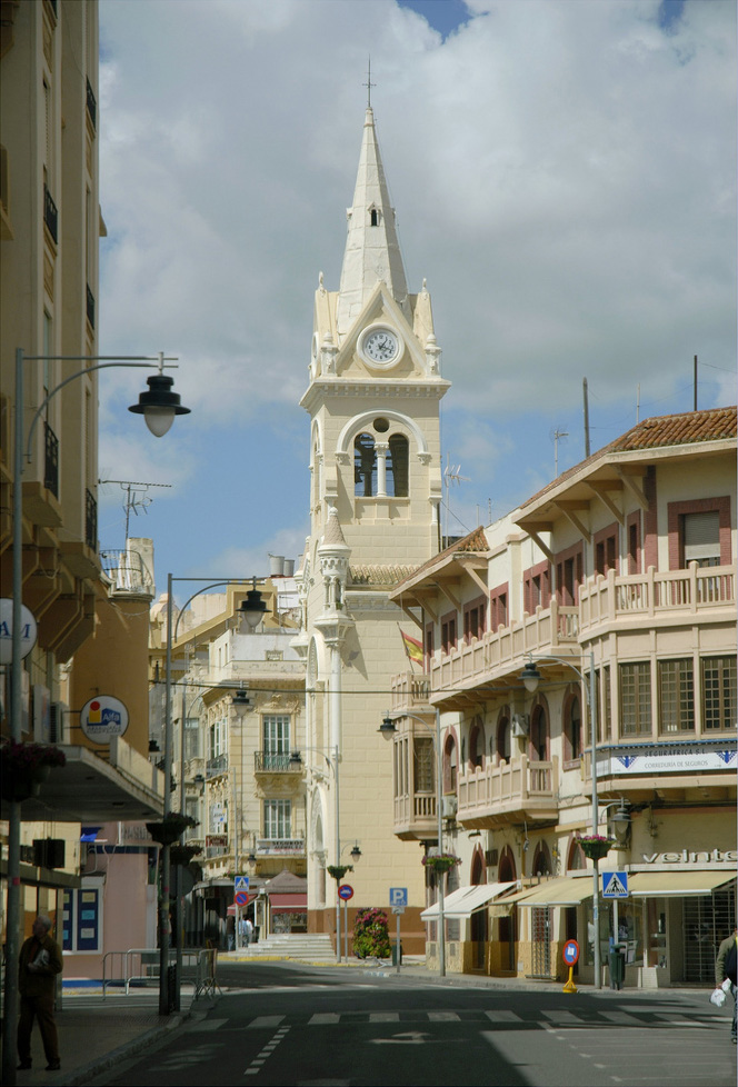 Calle Ejército Español, con la Iglesia del Sagrado Corazón antes del desmonte de su cúpula.